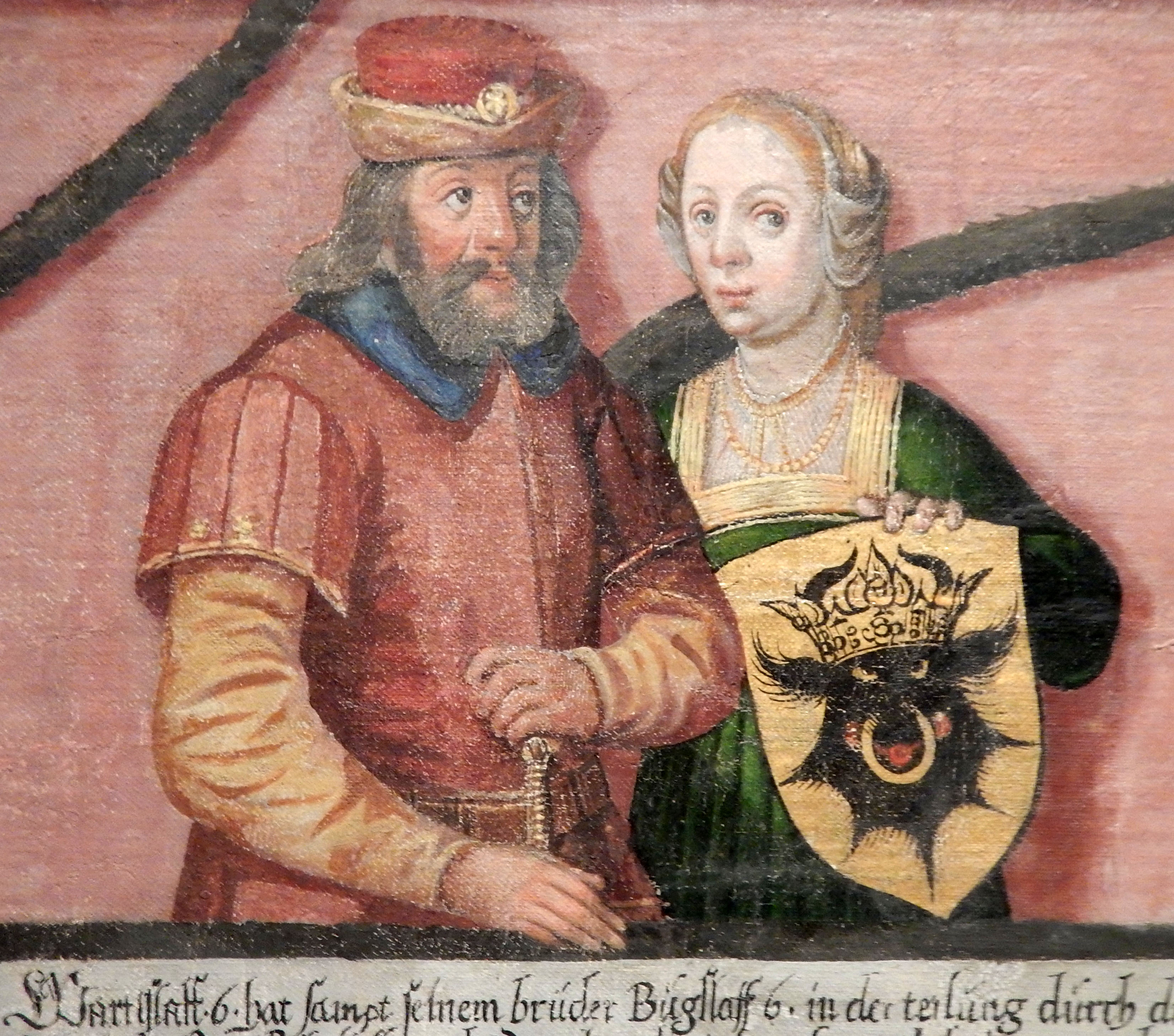 Wartislaw VI. von Pommern mit seiner Gemahlin Anna von Mecklenburg-Stargard.